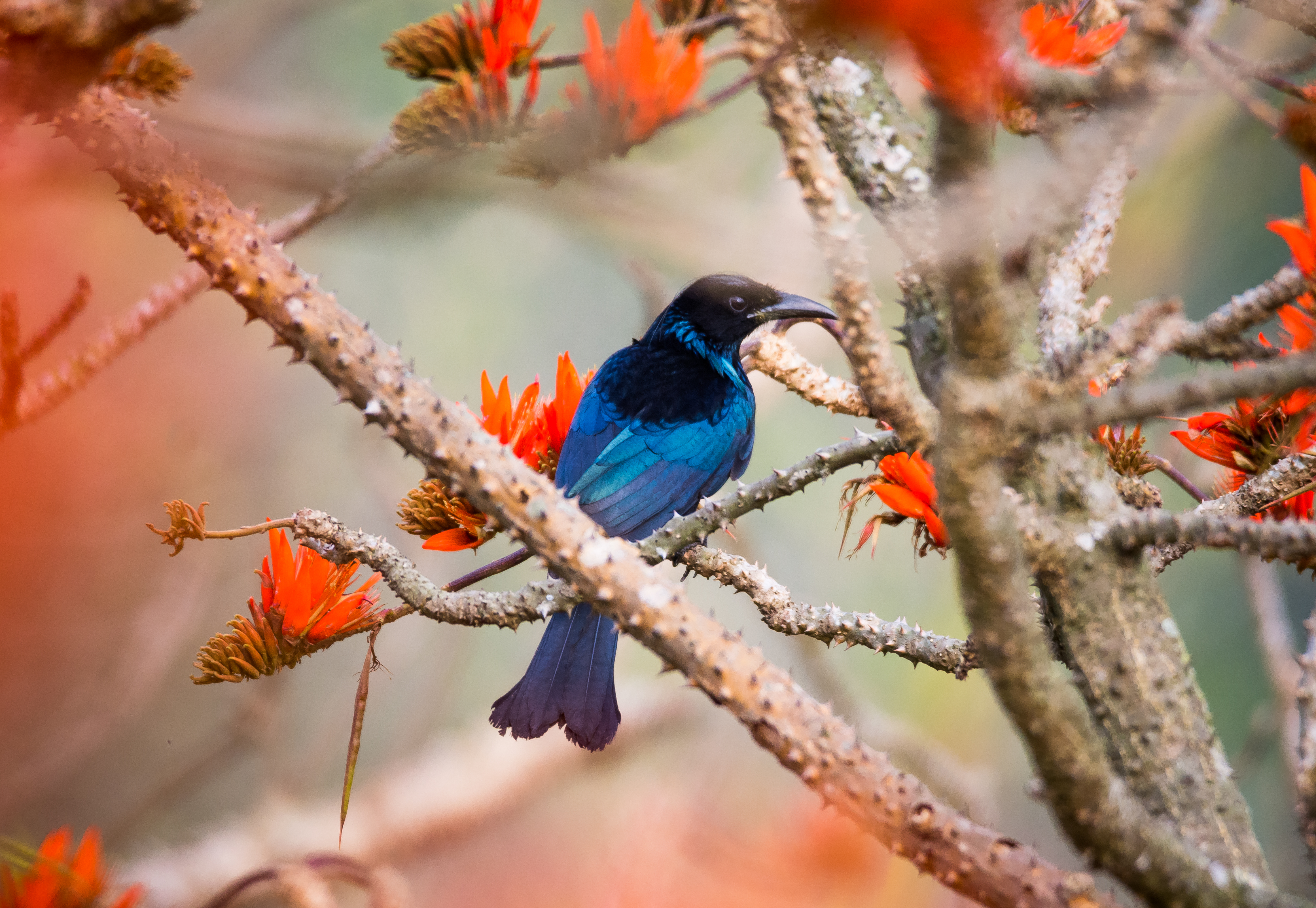 সাতছড়ি জাতীয় উদ্যান